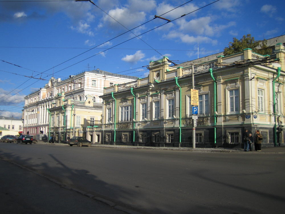 ул. Орджоникидзе (07.09.05)